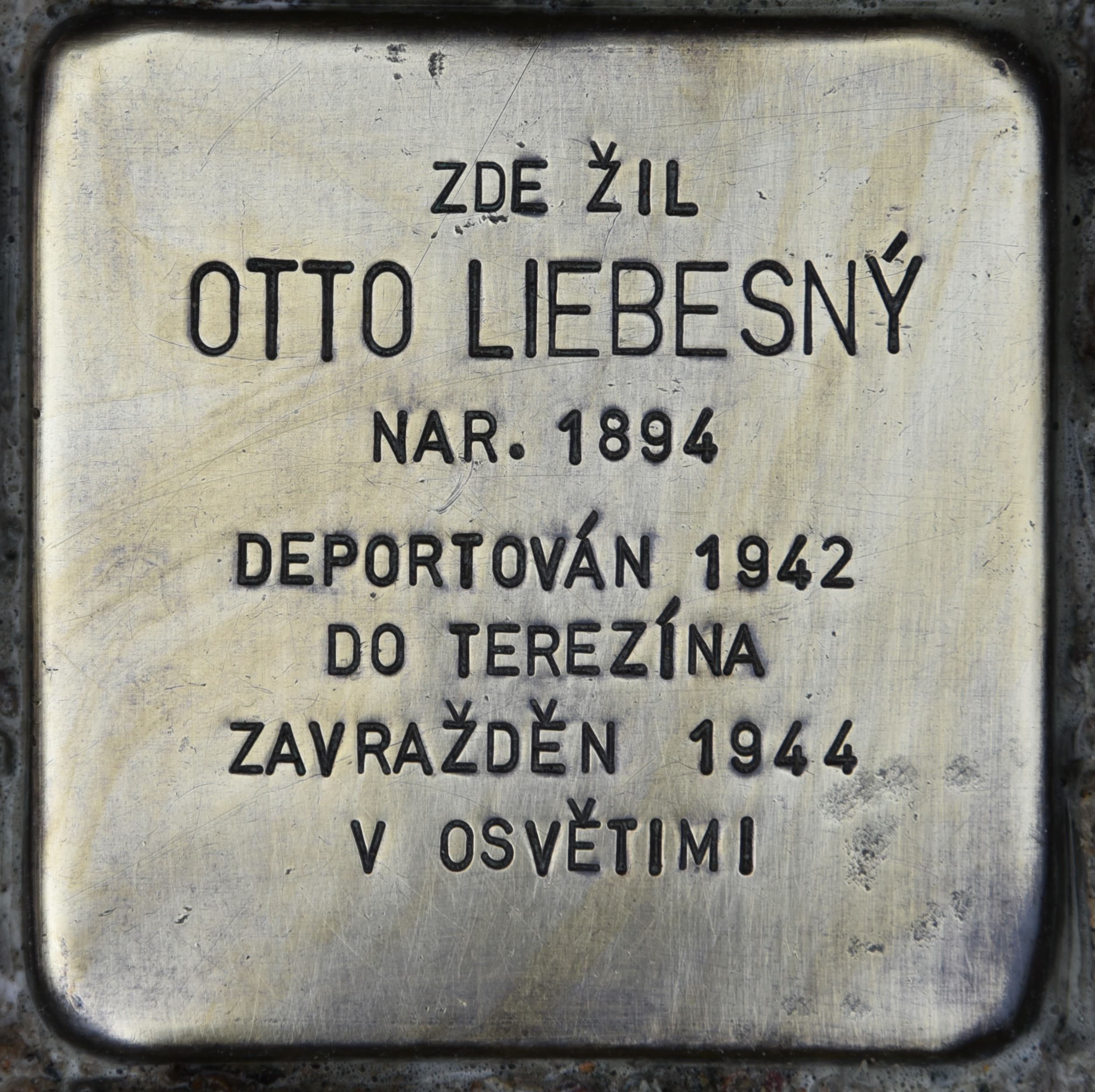 Stolperstein für Otto Liebesny